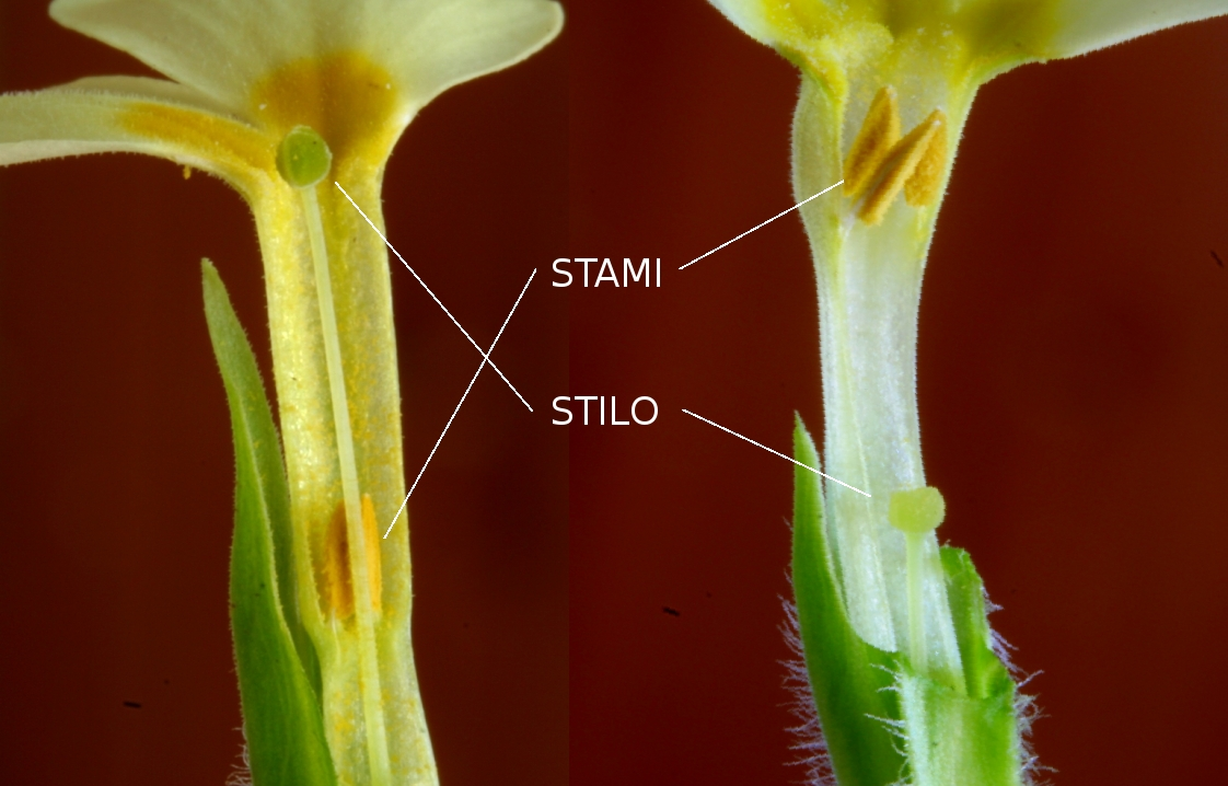 Primula_vulgaris (Primula comune)